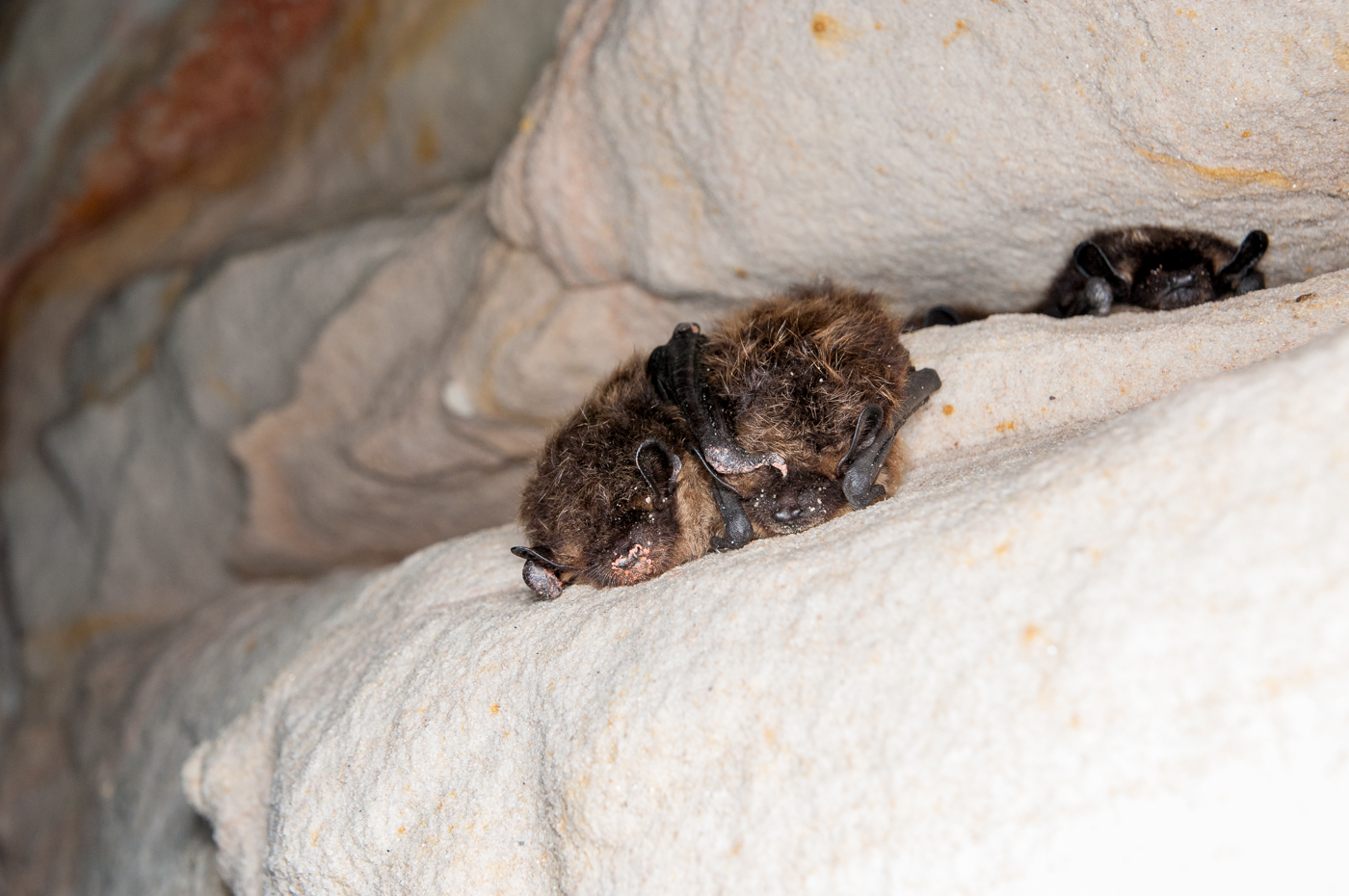 Põhja-nahkhiir. Pildistatud Eestis.